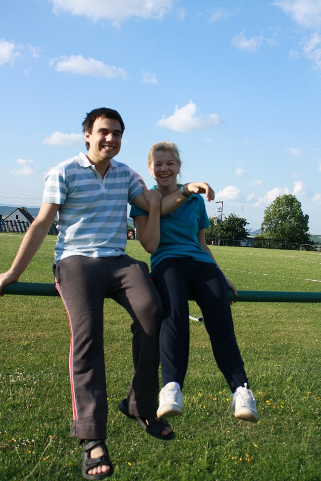 Přátelé